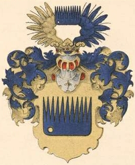 Anrepi suguvõsa aadlivapp (Eestimaa)